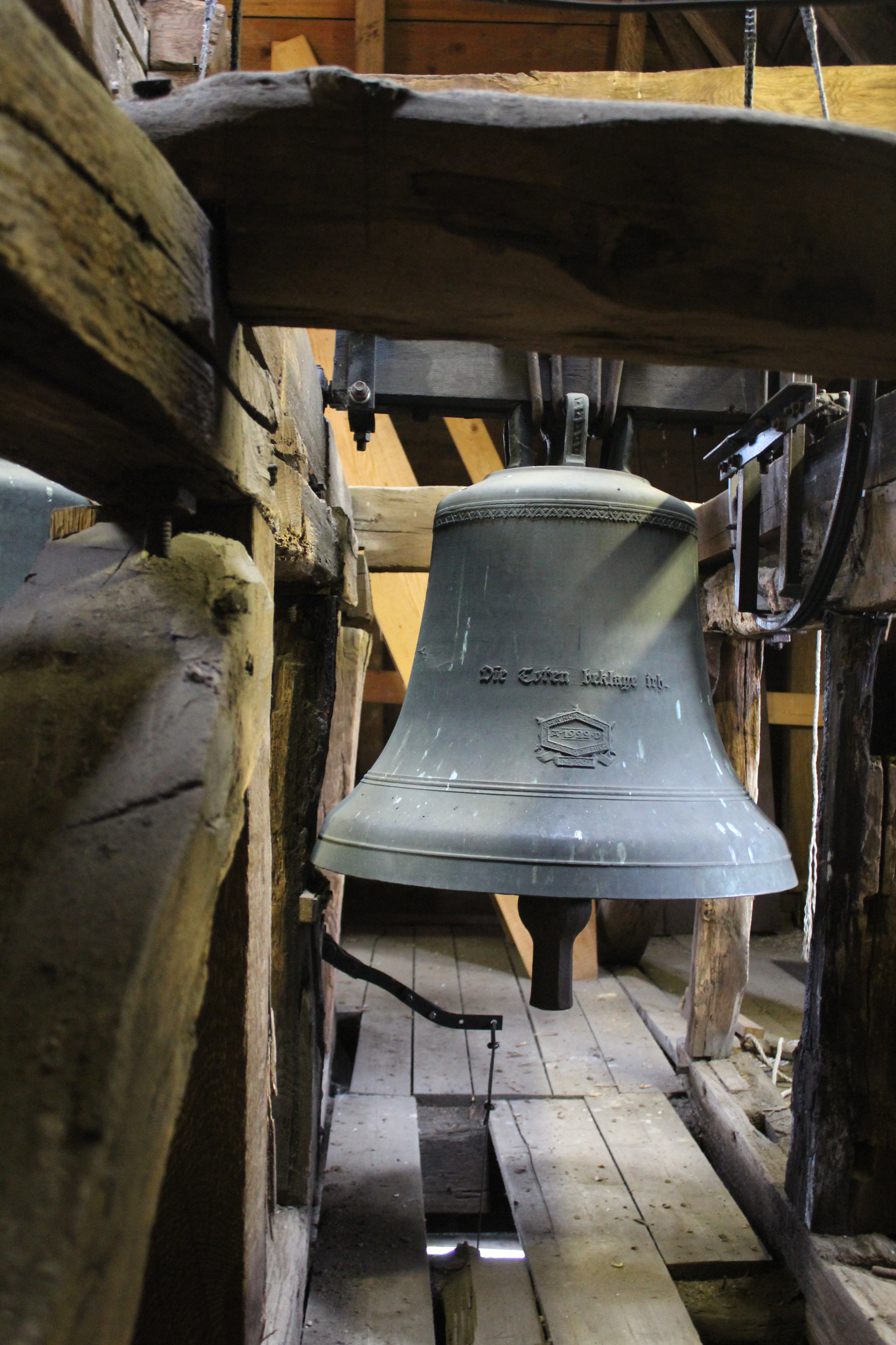 Evangelische Kirche Ober-Ohmen, Mücke, Vogelsbergkreis, Hessen, Deutschland